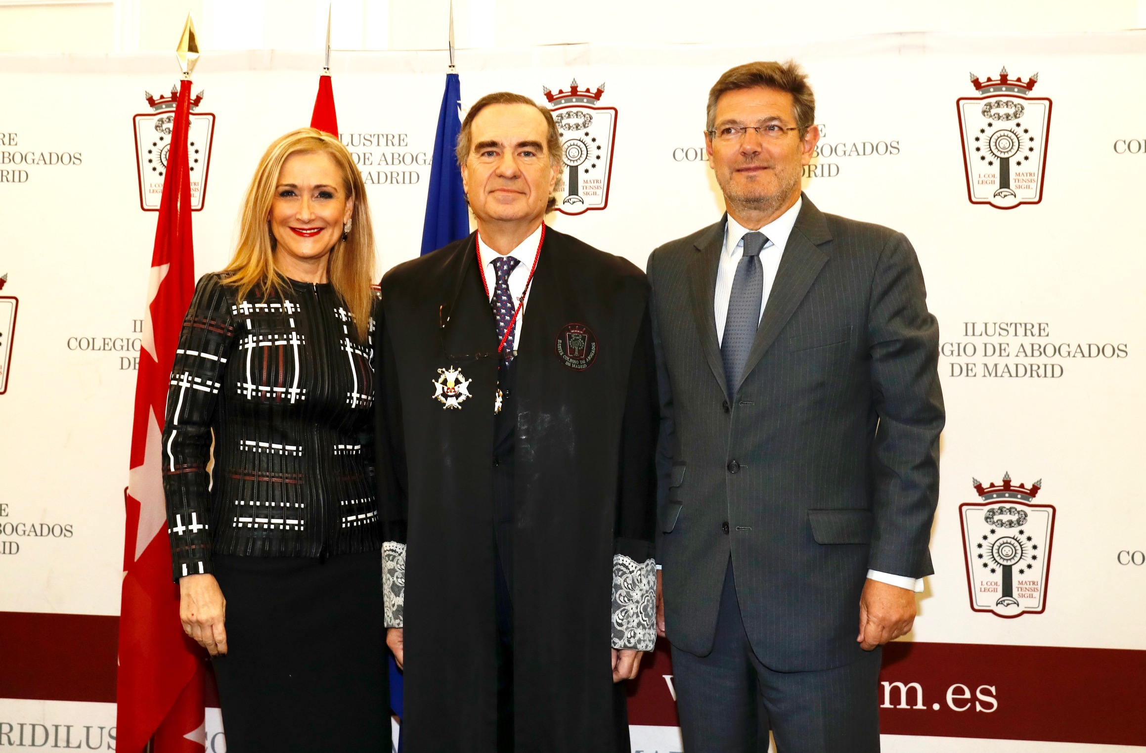 La presidenta de la comunidad de Madrid Cristina Cifuentes y el ministro de Justicia Rafael Catalá en la toma de posesión de José María Alonso Puig como nuevo Decano del Colegio de Abogados de Madrid.